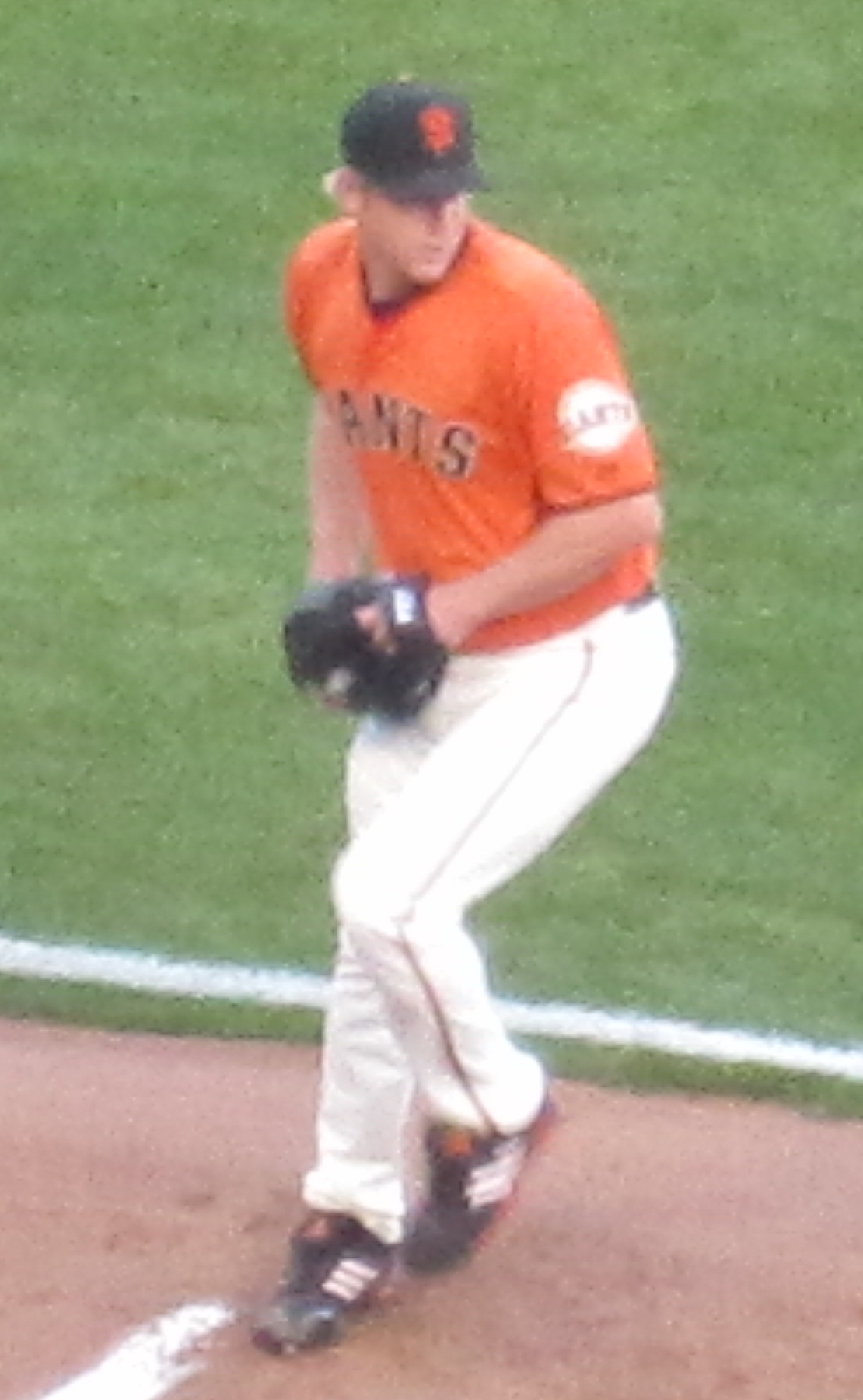 Todd Wellemeyer